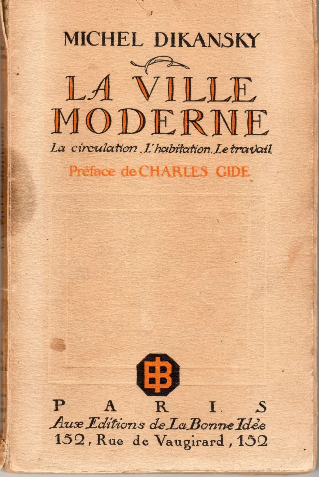 Обложка книги М.Г. Диканского La ville moderne: la circulation, l'habitation, le travail